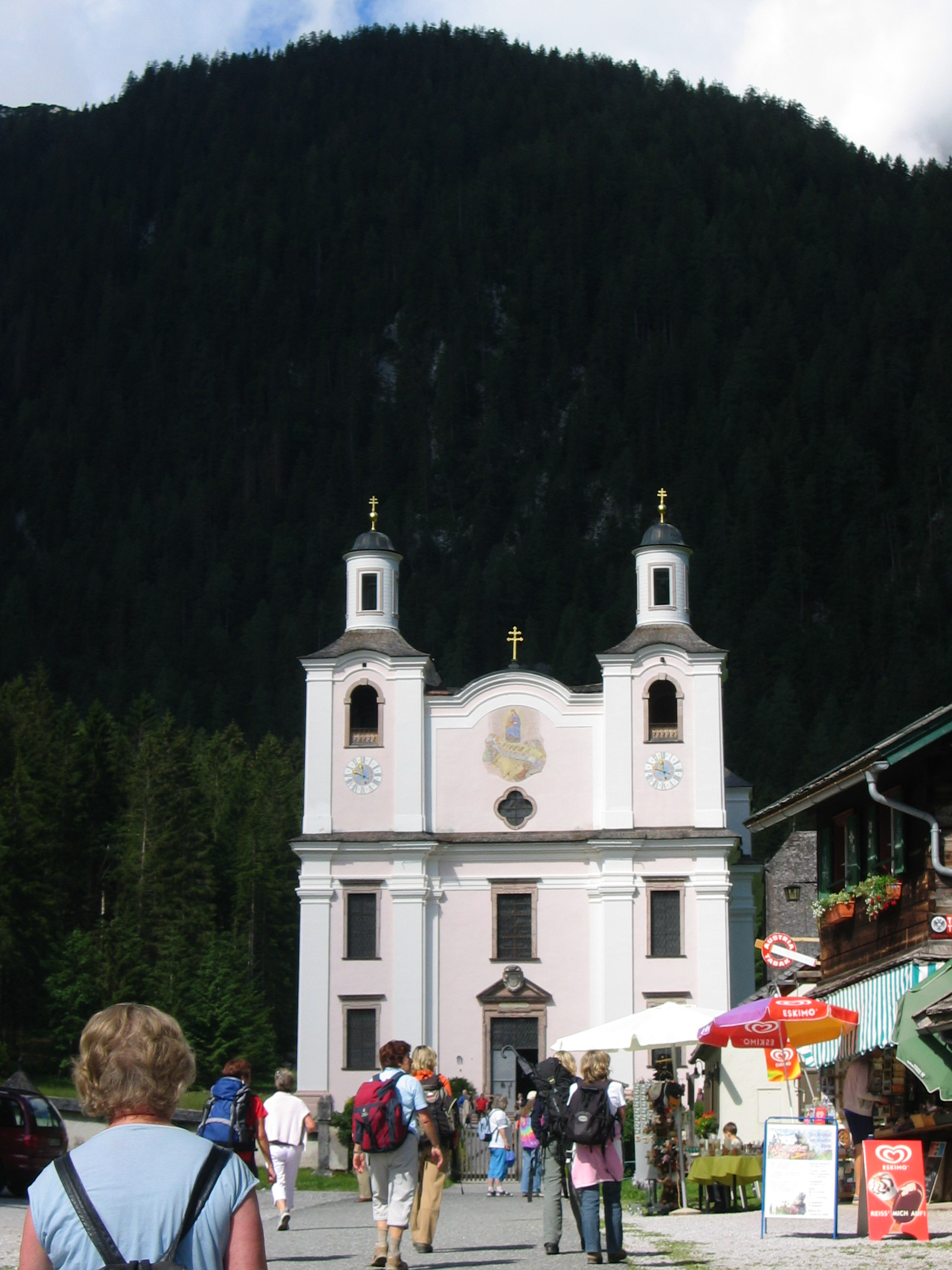 Kirche Maria Kirchenthal im Bundesland Salzburg